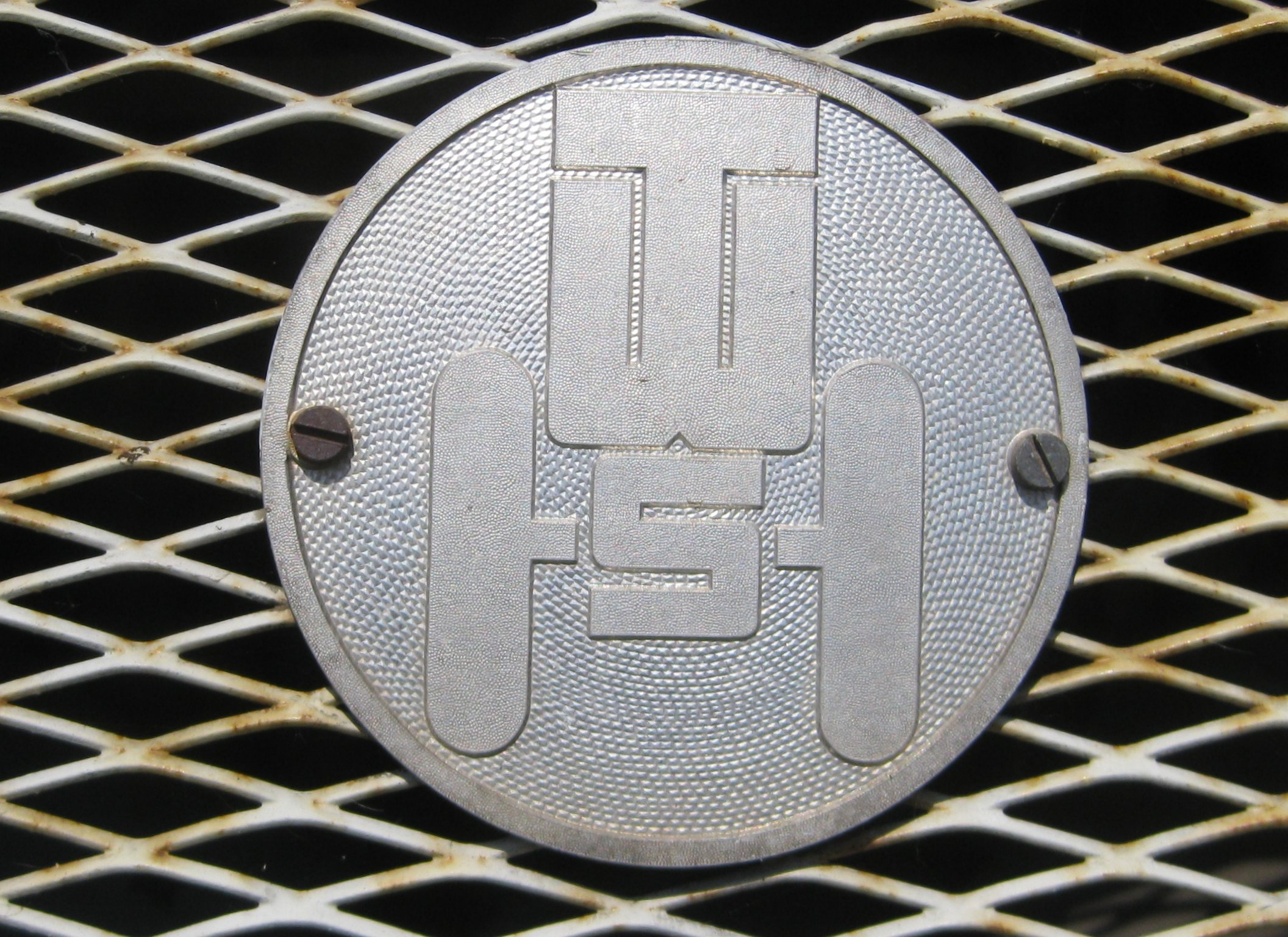 Traktor Fortschritt (DDR) Emblem